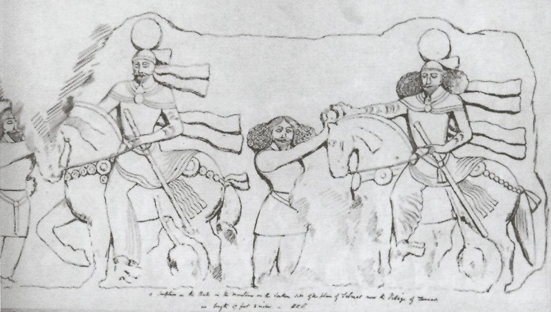 Salmas Khantakhti Relief